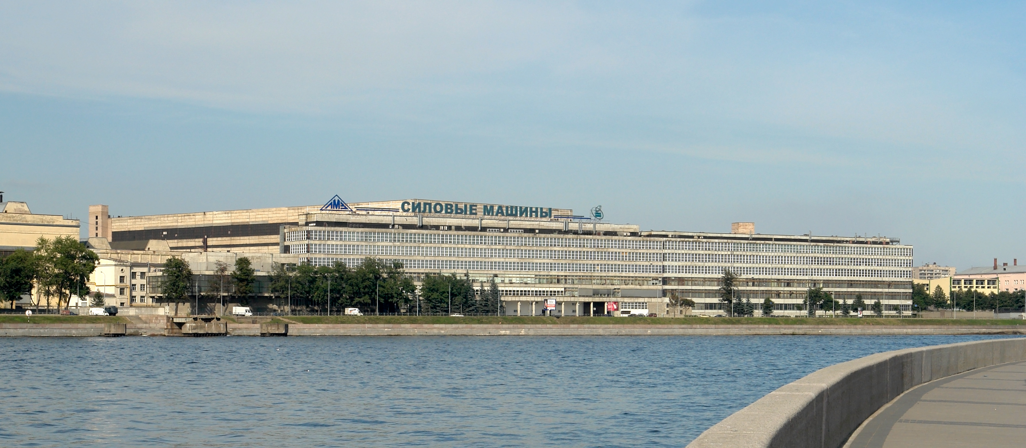 Здание ЛМЗ на Свердловской набережной (с противоположного берега)